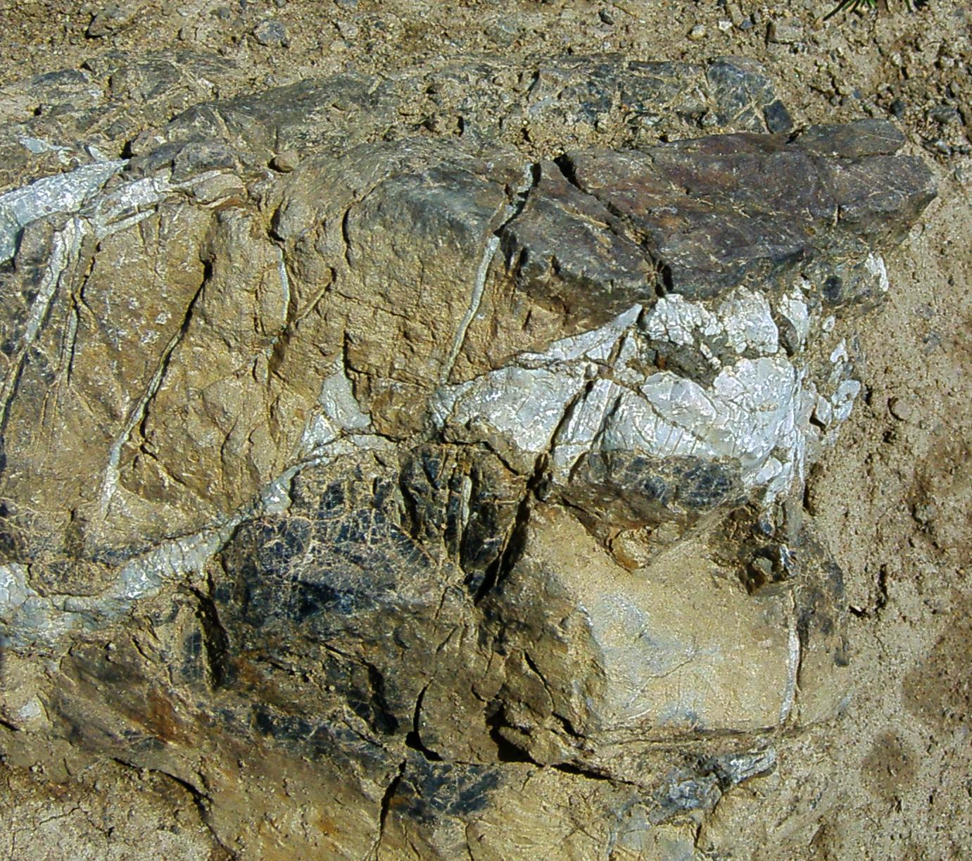 Brekzie auf der Spitze des Sigiswanger Horn (Bildbreite etwa 1 Meter)